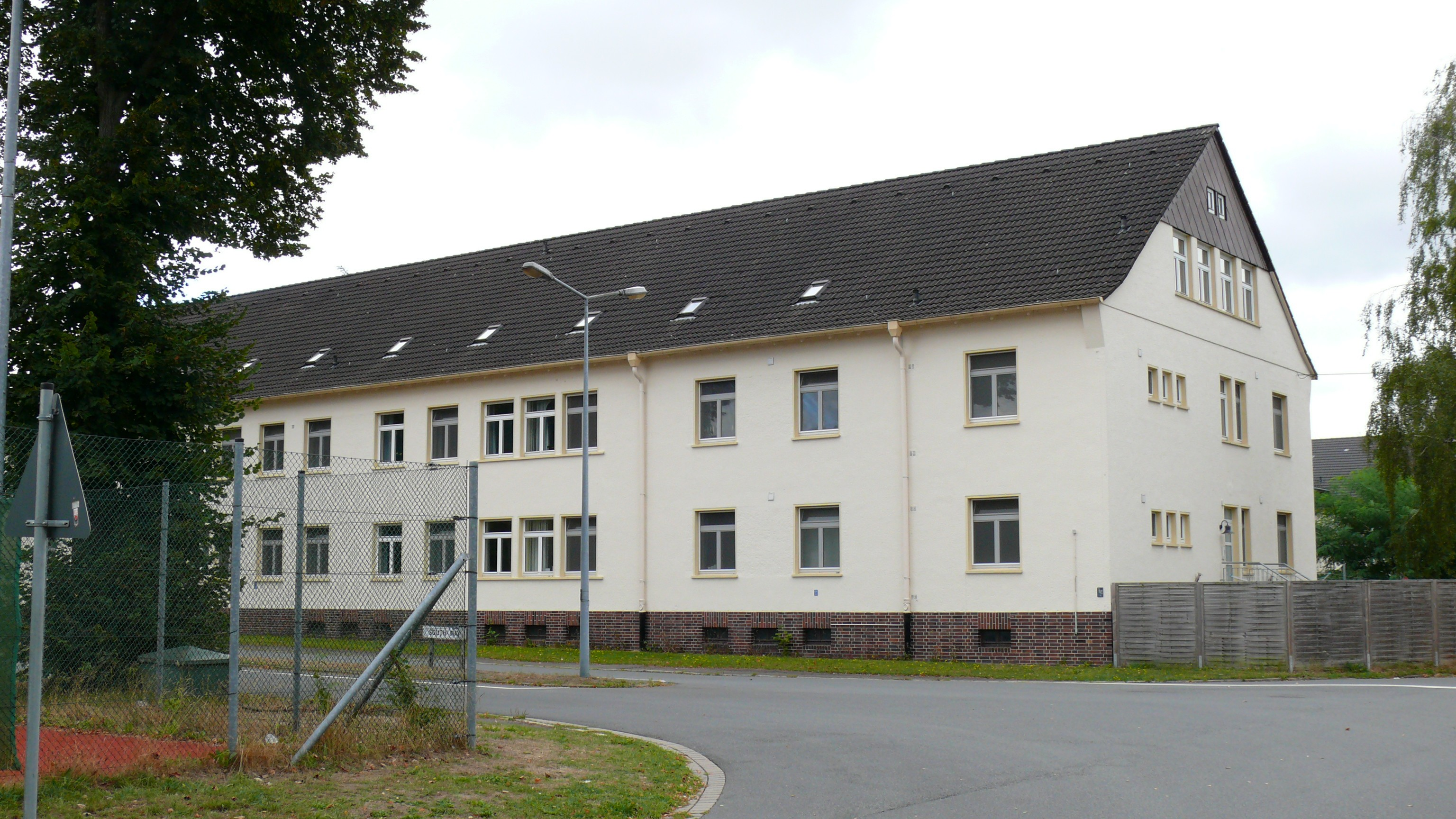 Kaserne in Bergen-Belsen, in dem 1945 ein Teil des DP-Camps untergebracht war.